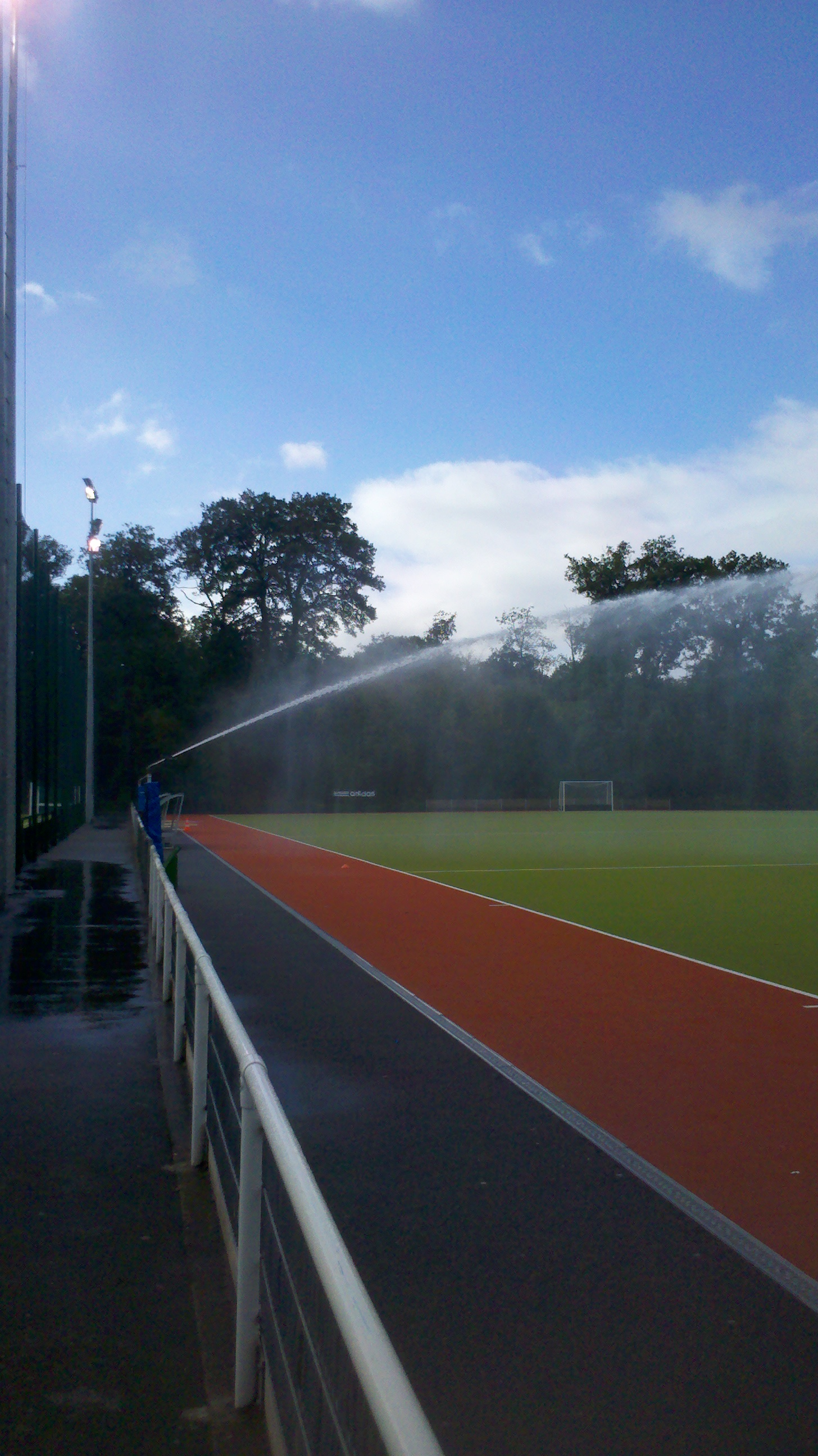 Arrosage automatique d'un terrain synthétique de hockey, à St Germain en Laye